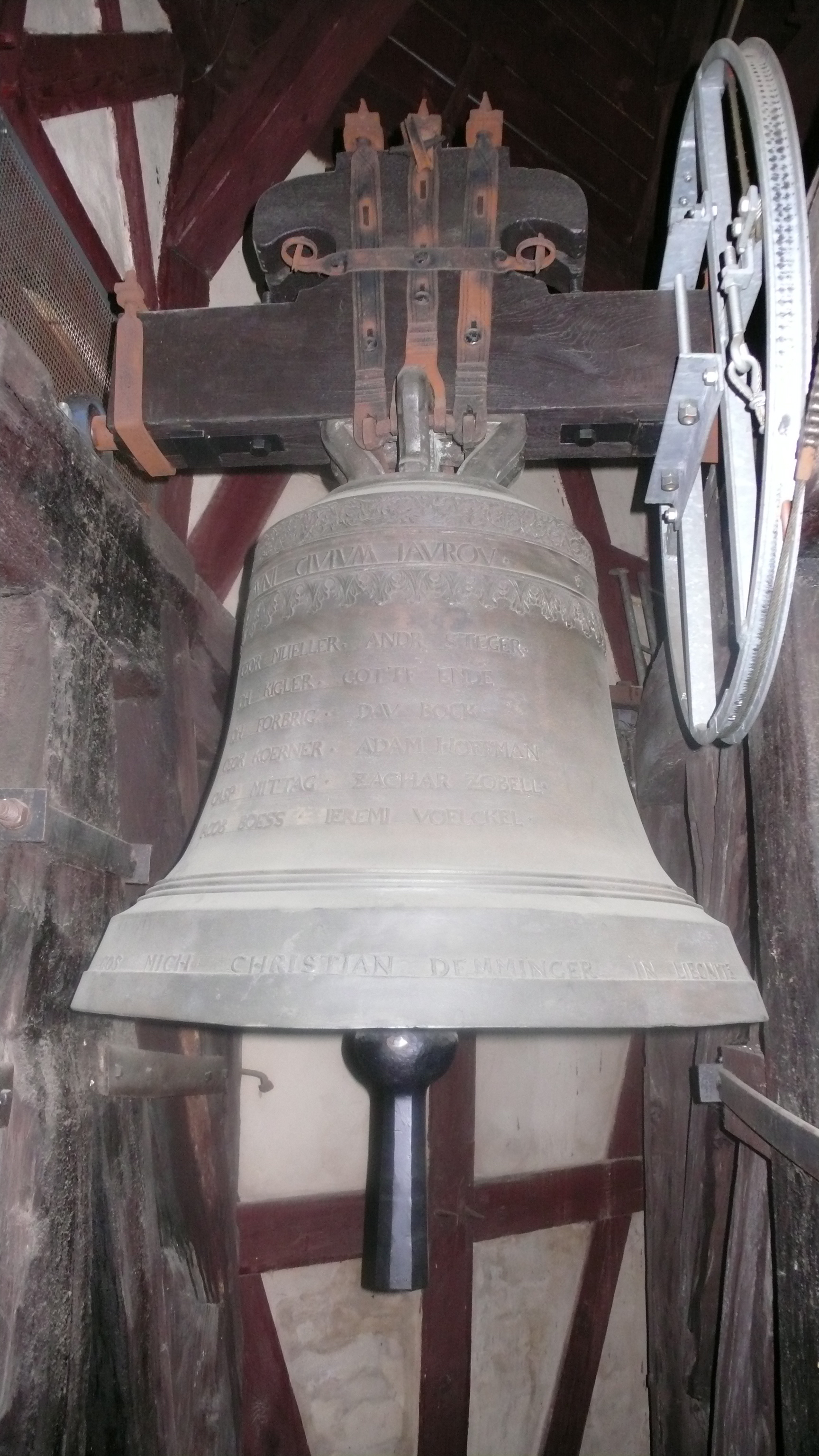 Glocke in der Evang. Friedenskirche Jawor (PL)